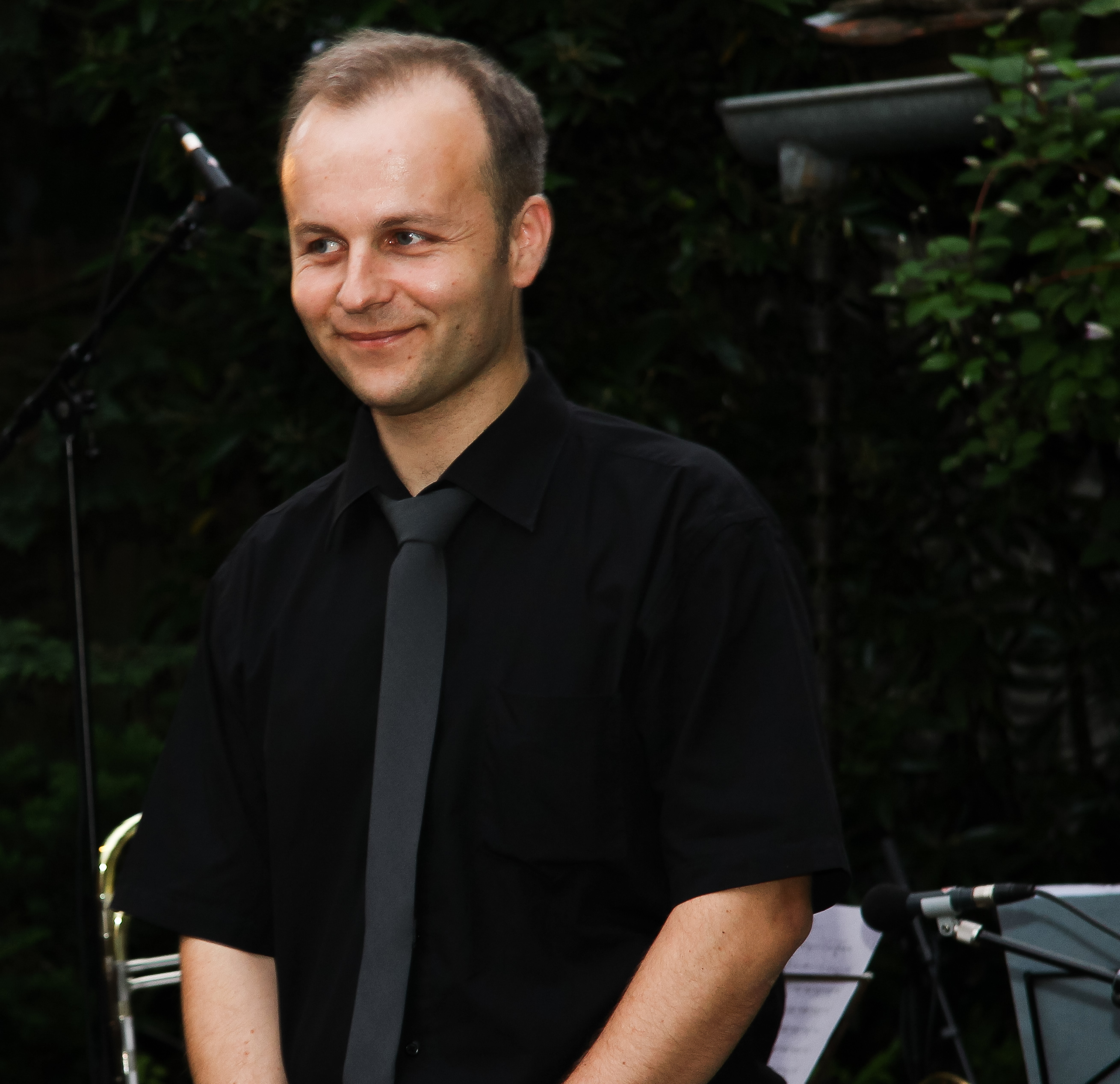 Dalibor Grubacevic in Salon Očić 2010